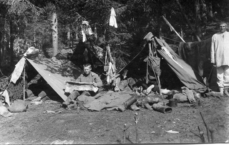 Духовщинский полк. Подъем в лагере. 1916 год.